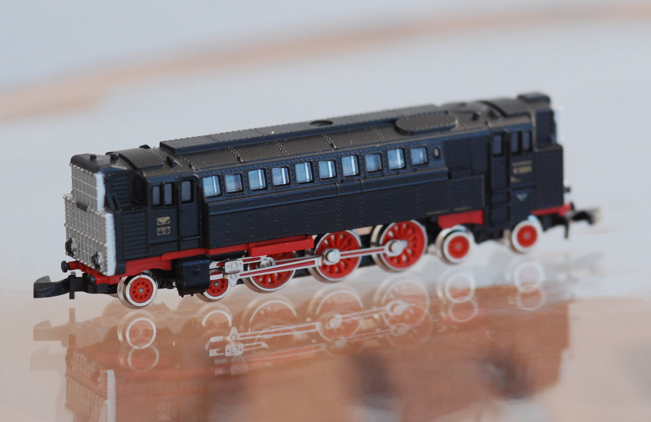 Modell einer DR V120 von Märklin in Spur Z, Maßstab 1:220